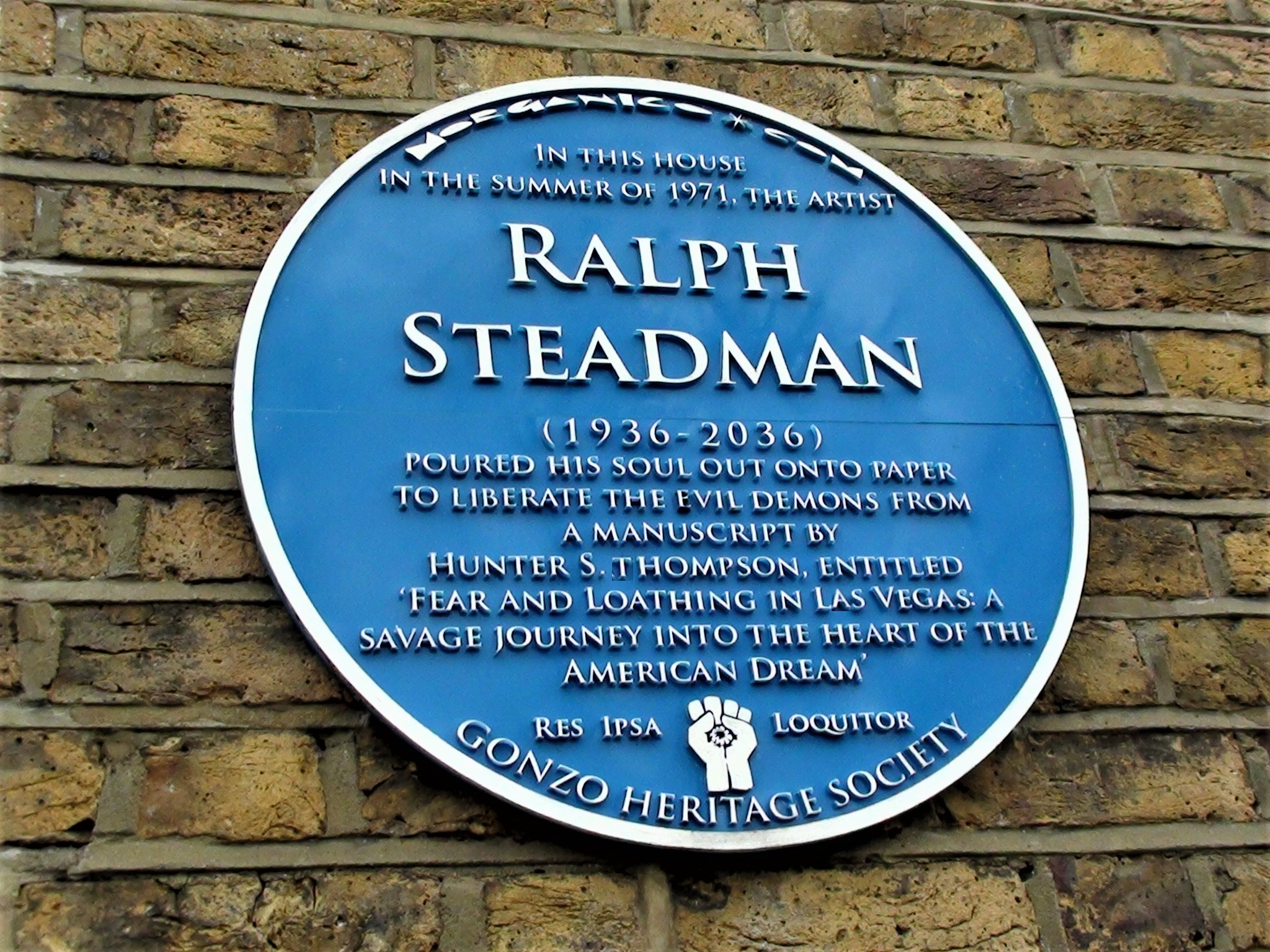 Аҧсшәа